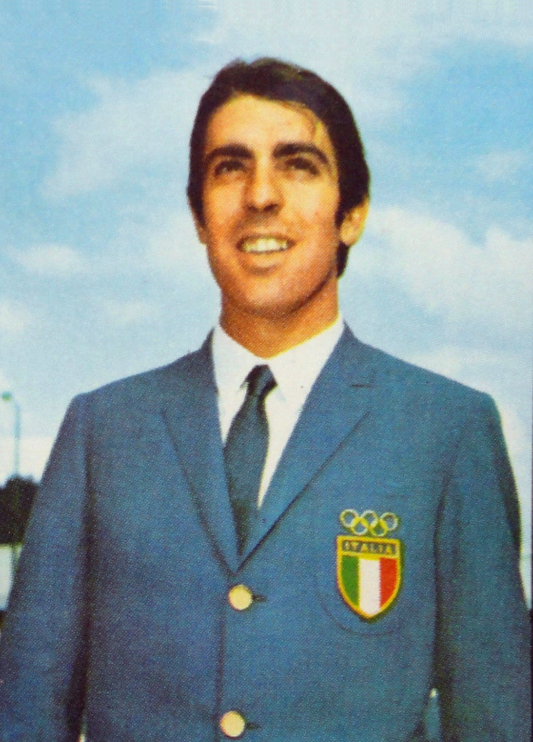 CAMPIONI DELLO SPORT 1969/70-n.376-ALBANESE (ITA)-SCHERMA